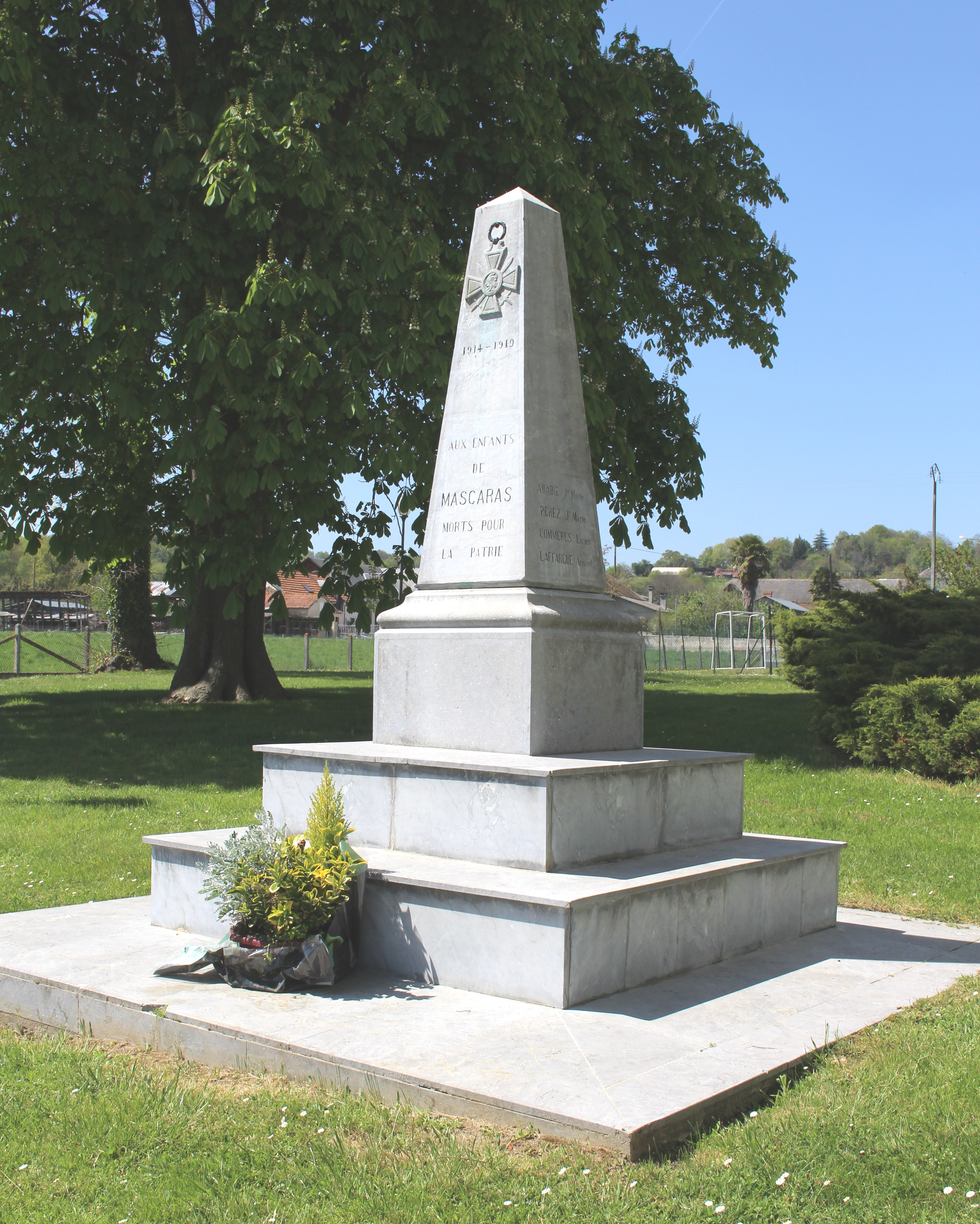 Monument aux morts de Mascaras (Hautes-Pyrénées)